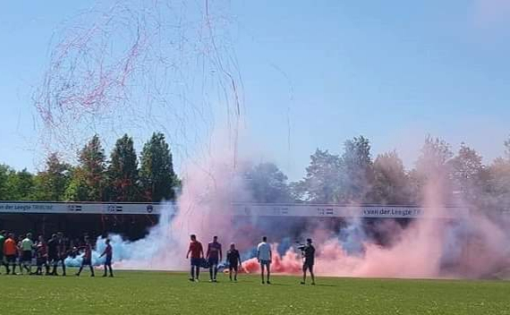 Sfeeractie voor aanvang van de met 2-1 gewonnen conpetitie wedstrijd tussen Hapert en Bladella